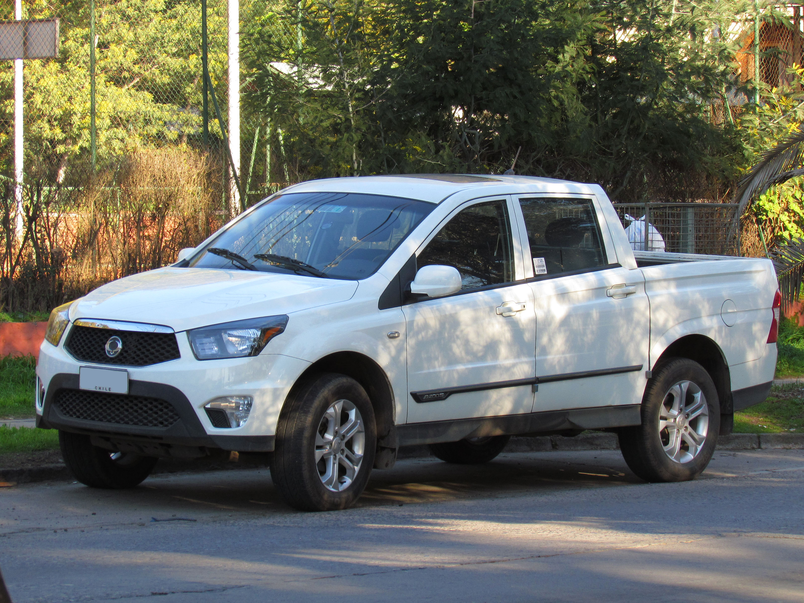 Ssangyong Actyon Sport A 200 S 2012